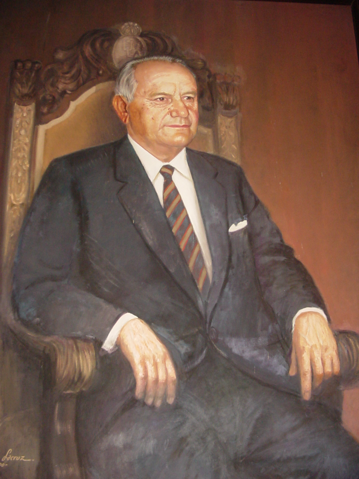 El rector Pedro Rincón Gutiérrez, comúnmente llamado Perucho.